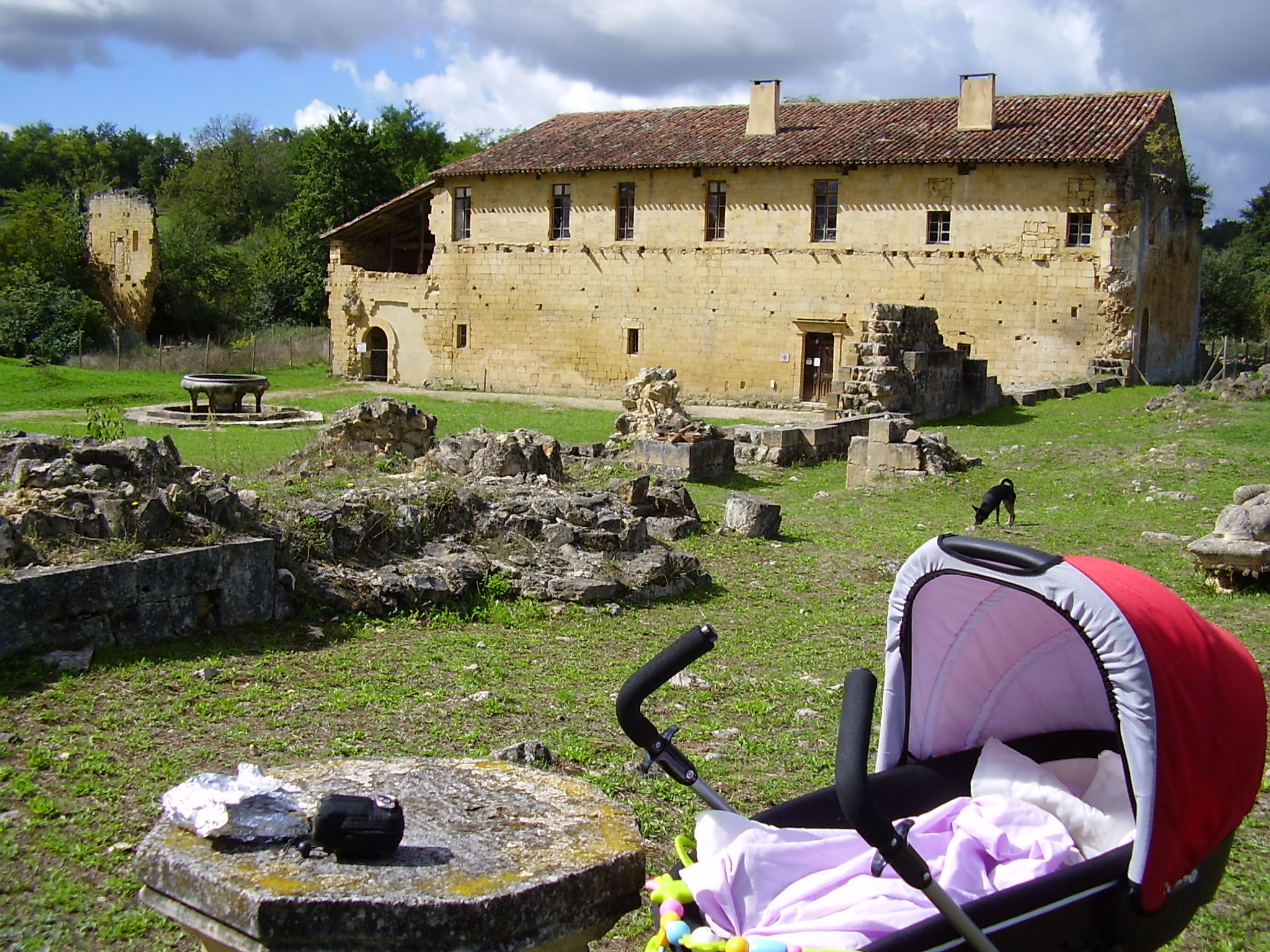 Abbaye de Bonnefont à Proupiary (Haute-Garonne, France